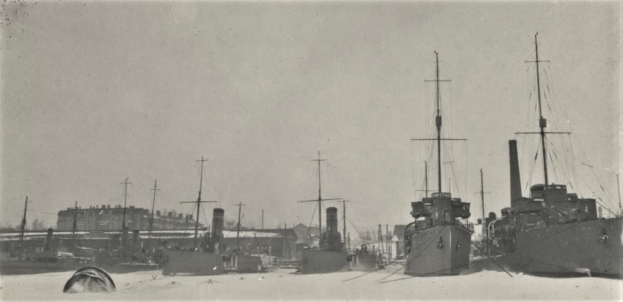 Eesti merejõudude sõjalaevad Sõjasadamas talvel. Paremalt: miiniristlejad (hävitajad) "Vambola", "Lennuk", miiniveeskajad "Ristna", "Suurop", abilaev "Jaan Poska", torpeedopaat "Sulev".